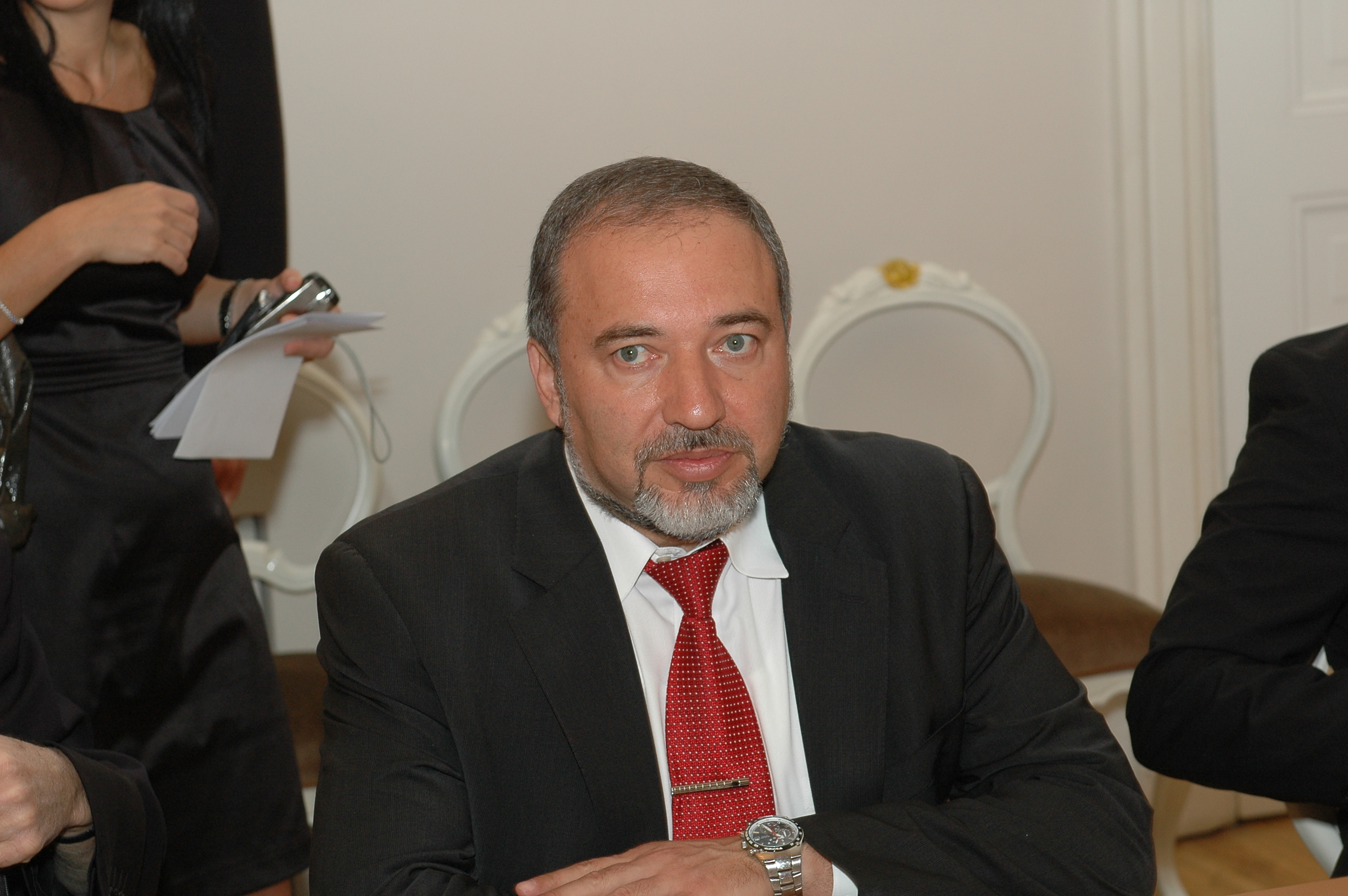 2010. gada 5. jūlijs. Saeimas priekšsēdētāja biedre Karina Pētersone tiekas ar Izraēlas Valsts ārlietu ministru Avigdoru Libermanu (Avigdor Liberman). Foto: Saeimas Kanceleja